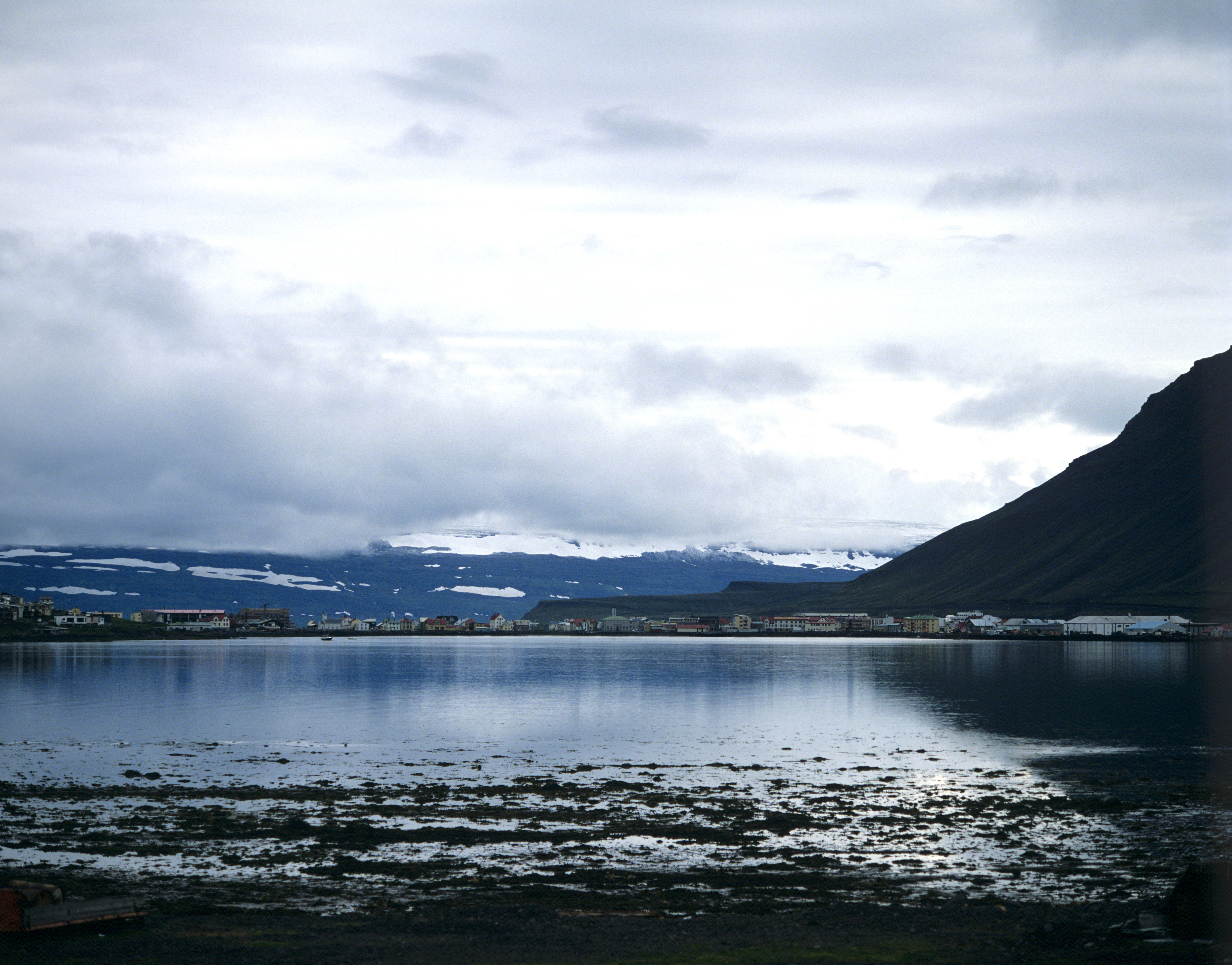 Ísafjörður.